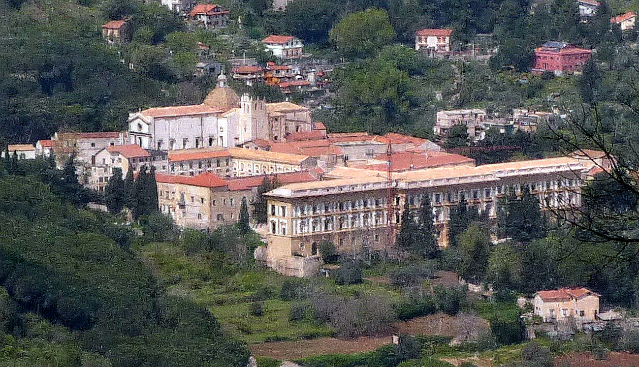 Abbazia di San Martino delle Scale bei Monreale, Sizilien, liegt im Dorf San Martino delle Scale auf ca. 589m über dem Meeresspiegel mit ca. 440 Einwohnern. Ursprünglich soll es eine von sechs sizilianischen Klostergründungen Papst Gregor des Großen (540-604) sein. Diese im 6. Jahrhundert errichtete Benediktinerabtei, geweiht dem Heiligen Sankt Martin, wurde 300 Jahre später von Sarazenen durch Brand vernichtet, bzw. zerstört. Erst im 14. Jahrhundert wurde es erneut auf- und später ausgebaut. Die Bögen, die Korridore und der Chor der Mönche dieses Bauwerks erinnen an die mittelalterliche Bauzeit. Architektonisch markant ist heute noch der 1775 vom Architekten Giuseppe Venanzio Marvuglia (1729–1814) aus Palermo geschaffene damals neue Schlafsaal mit seiner Länge von 137 Metern, seinen drei Stockwerken und seiner Blickrichtung auf die Stadt Palermo, aus denen damals die meisten der Mönche von St. Martin kamen. Die Abtei mit ihrer bemerkenswerten Sammlung mittelalterlicher Kunst besteht in geänderter Größe und Aufgabe heute noch. Während des Zweiten Weltkriegs wurden zahlreiche Artefakte der Region von der italienischen Archäologin Jole Bovio Marconi (1897-1986) in diese Klosteranlage in Sicherheit gebracht.